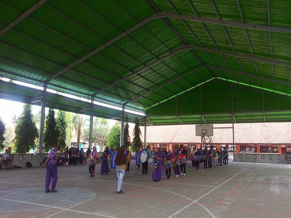 indoor ini adalah salah satu fasilitas di smpn 33 purworejo